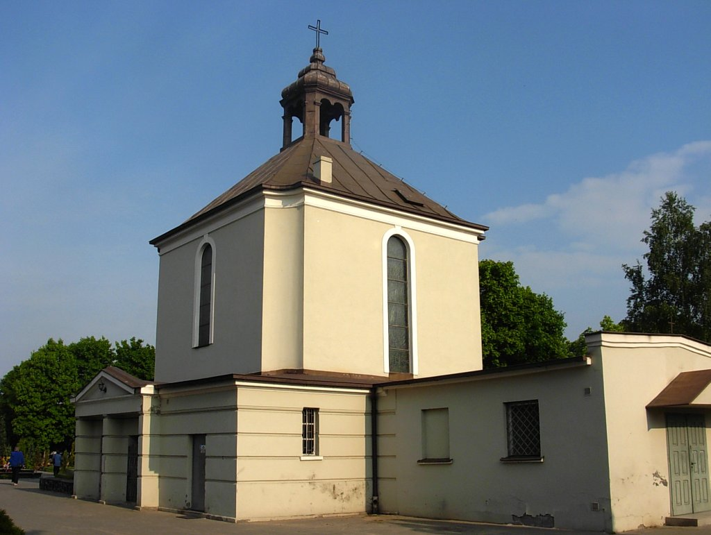 Cmentarz św. Wincentego Bydgoszcz